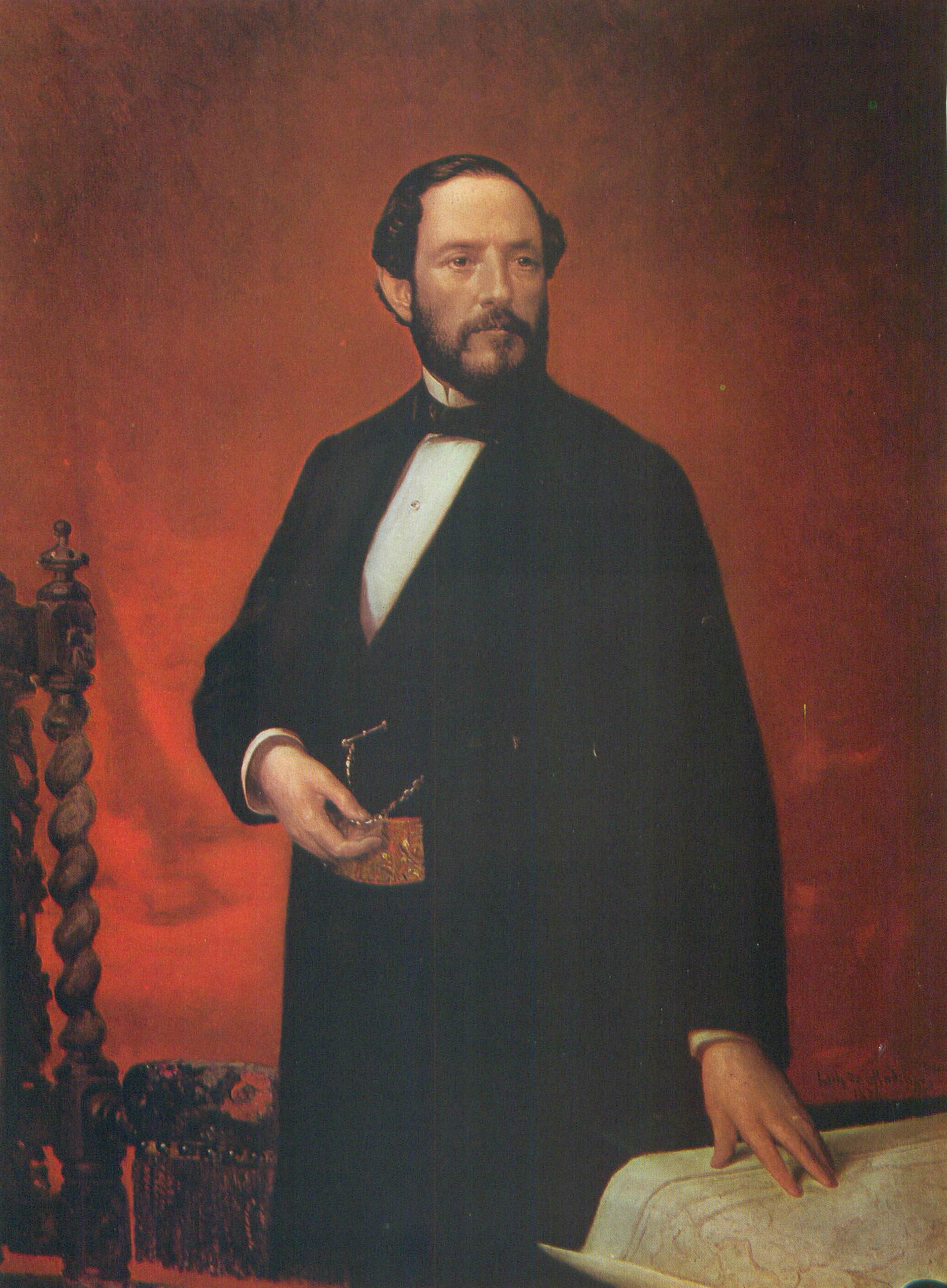 Retrato del general Juan Prim y Prats (1814-1870), conde de Reus, marqués de los Castillejos y vizconde del Bruch. Llegó a ser Presidente del Consejo de Ministros de España y en su vida militar participó en la Primera Guerra Carlista y en la Guerra de África, donde mostró relevantes dotes de mando, valor y temeridad. Tras la Revolución de 1868 se convirtió en uno de los políticos más influyentes de España, patrocinando la entronización de la Casa de Saboya en la persona de Amadeo I de España, pero fue asesinado poco antes de que Amadeo I llegase a España.